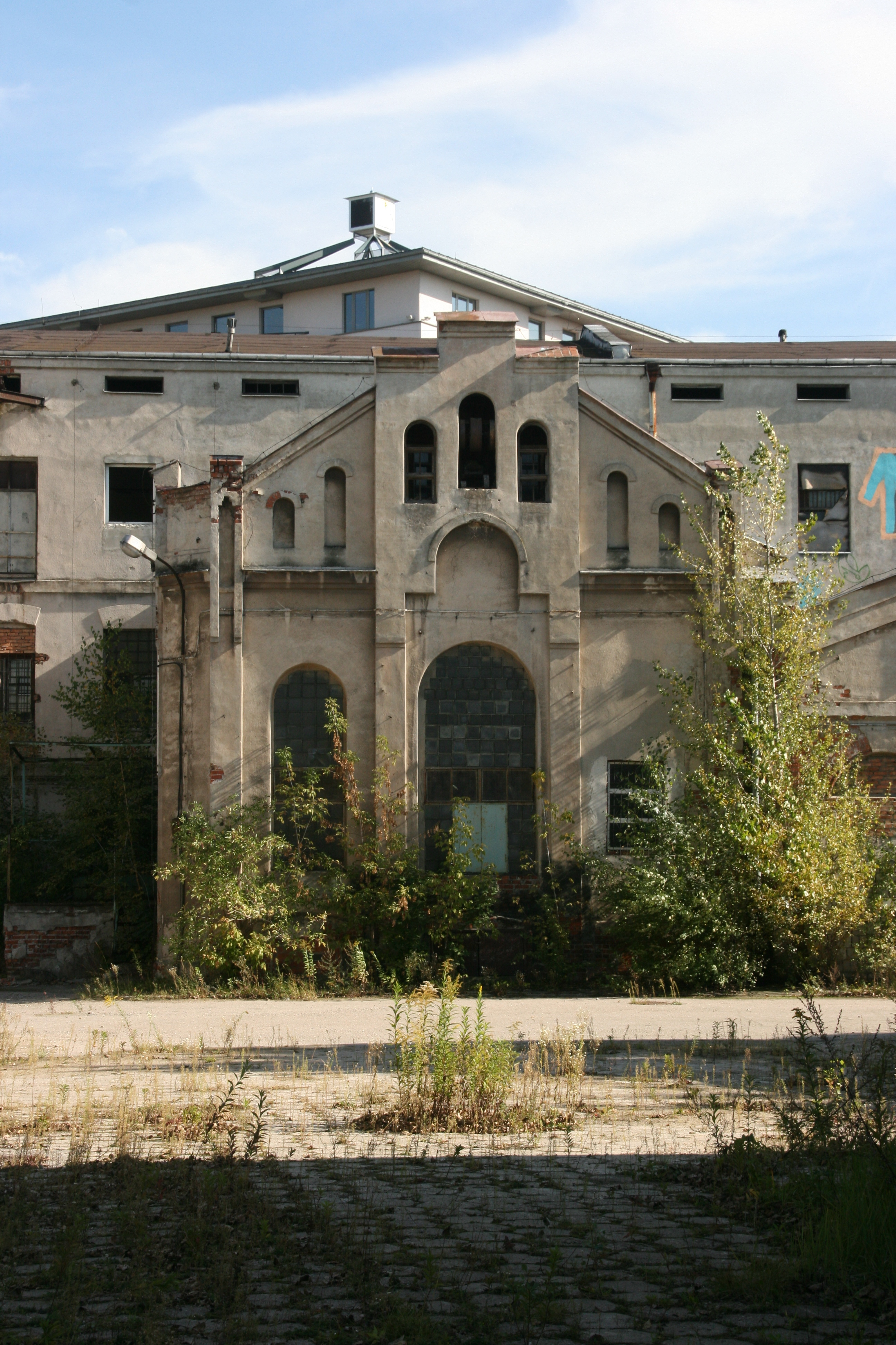 Budynki w zespole dawnej garbarni Temler i Szwede. Warszawa, ul. Okopowa 78, Wola